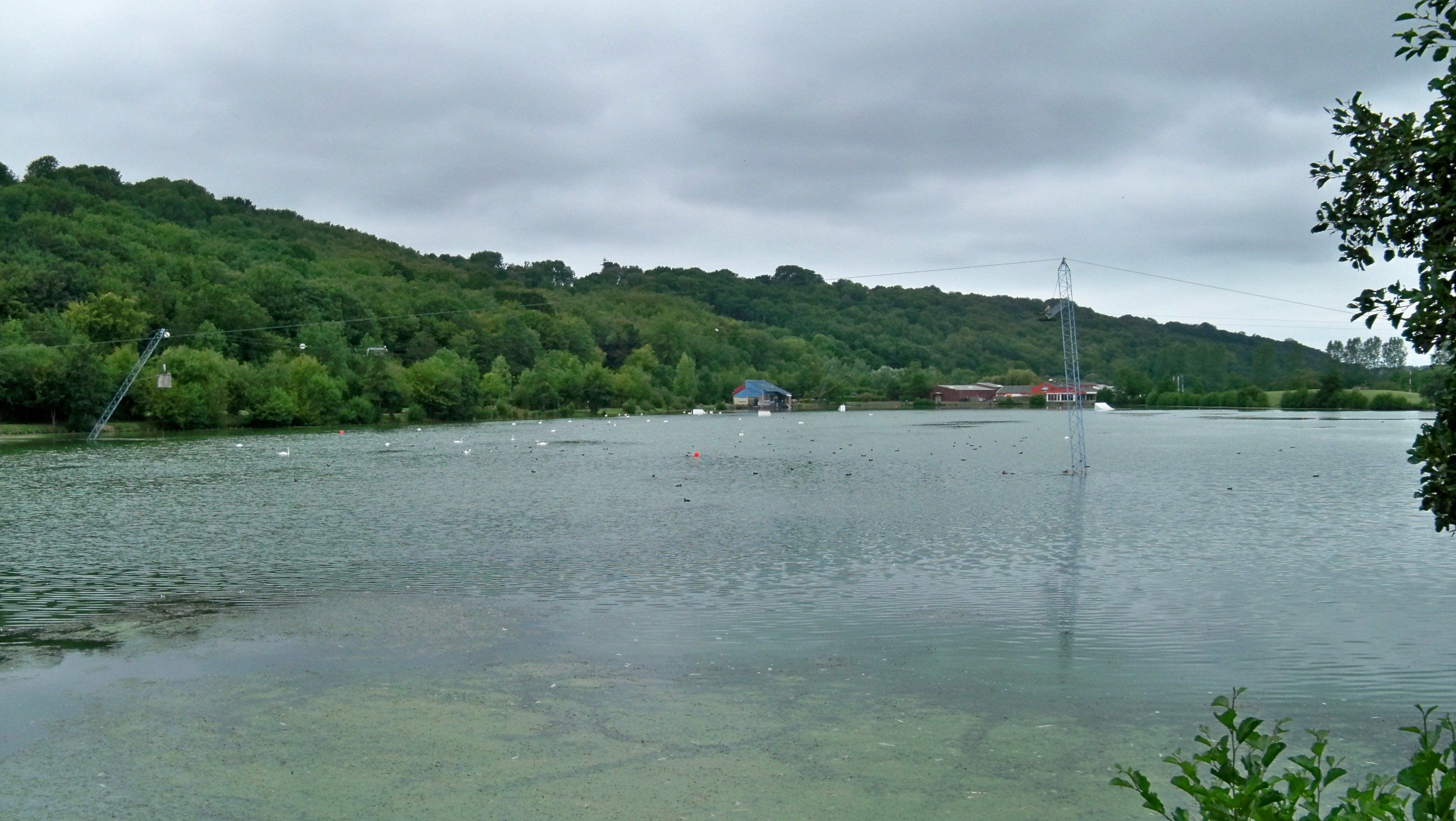 Lac de Caniel